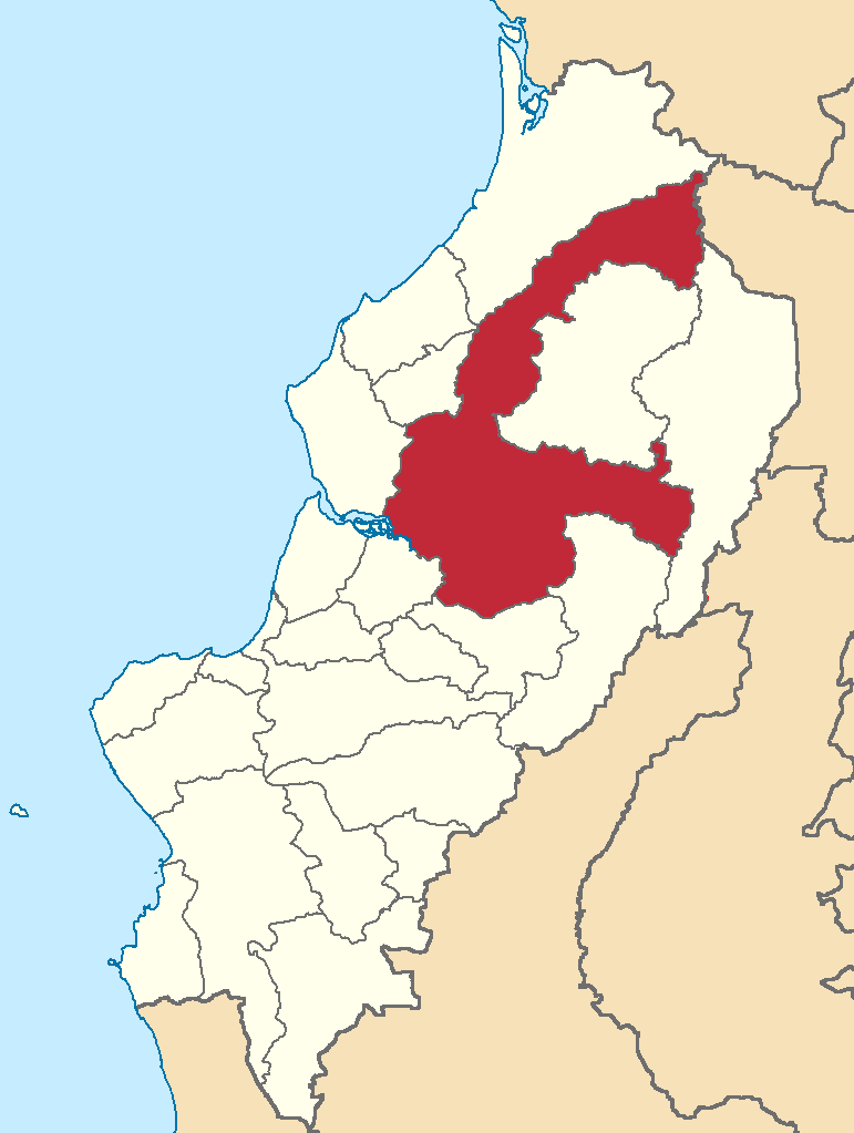 Mapa localizador del cantón en Manabí, Ecuador